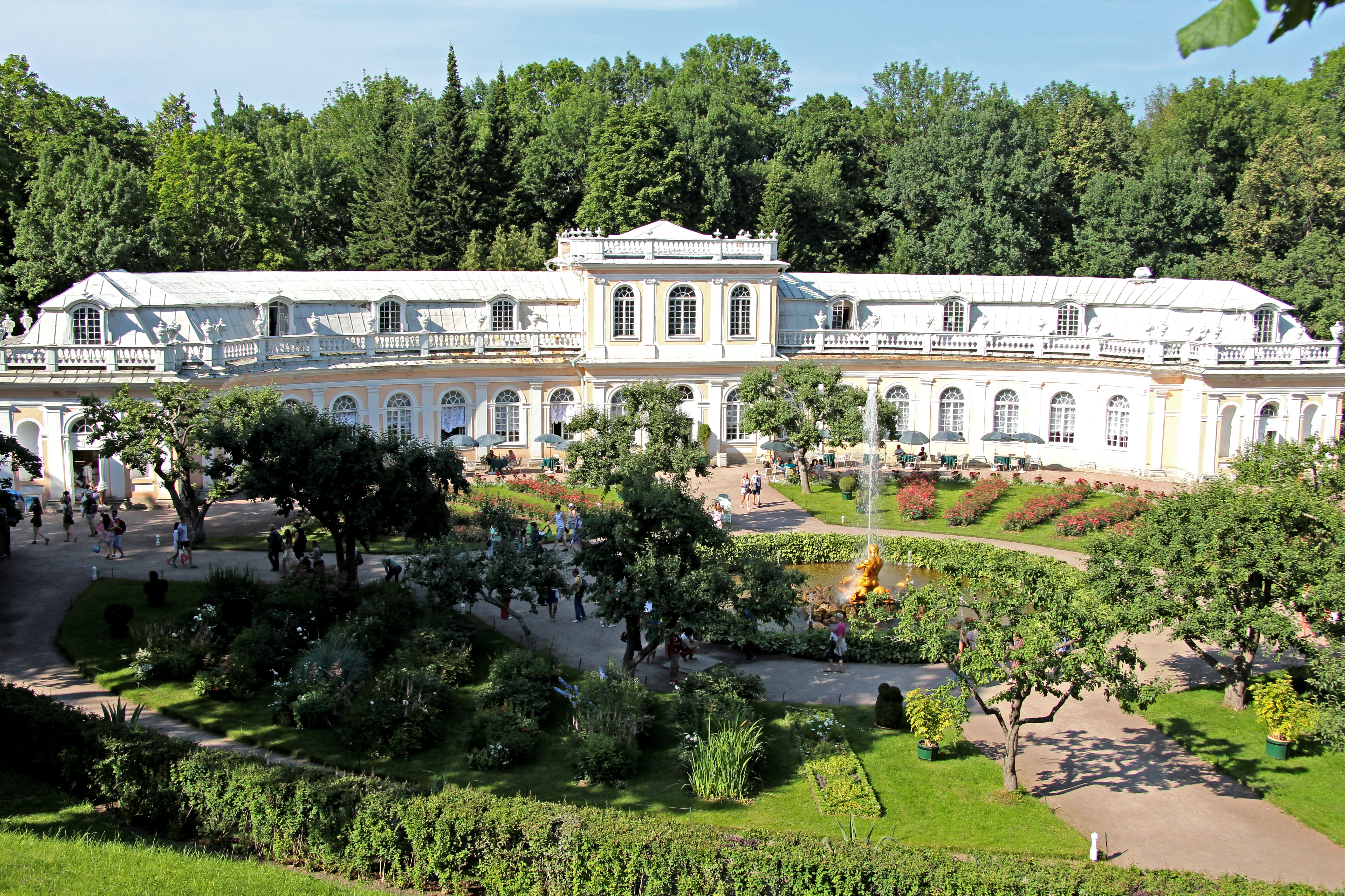 Сад Оранжерейный: восточная часть Нижнего парка, Петергоф, Петродворцовый район, Санкт-Петербург